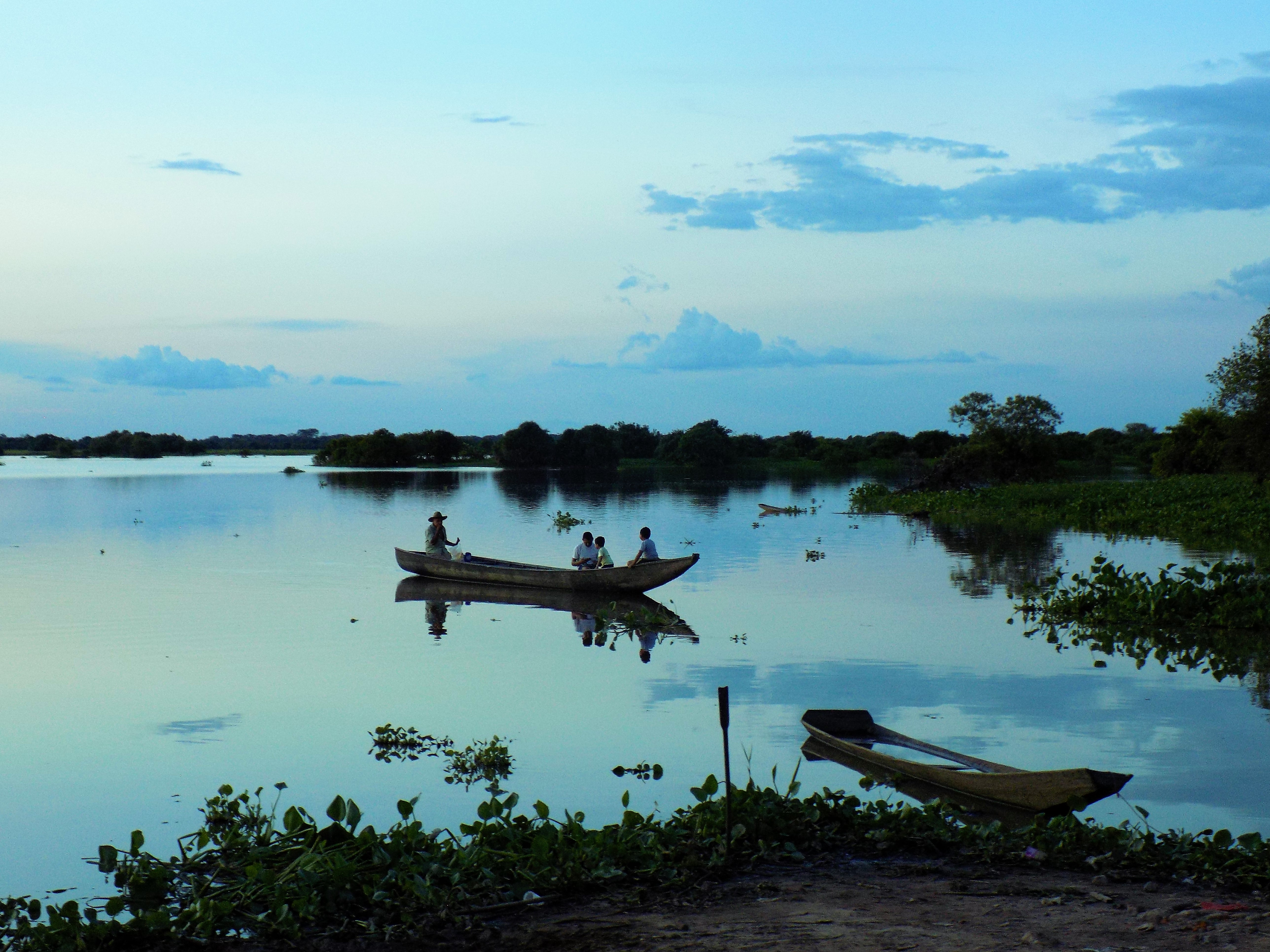 Esta laguna provee a los habitantes del municipio de distintas especies de peces durante gran parte del año y dada su belleza se posiciona como un importante atractivo turístico de la región. Hace parte de las costumbres de sus habitantes ir en horas de la tarde a contemplar el crepúsculo e ir de pesca cuando ha caído el sol.